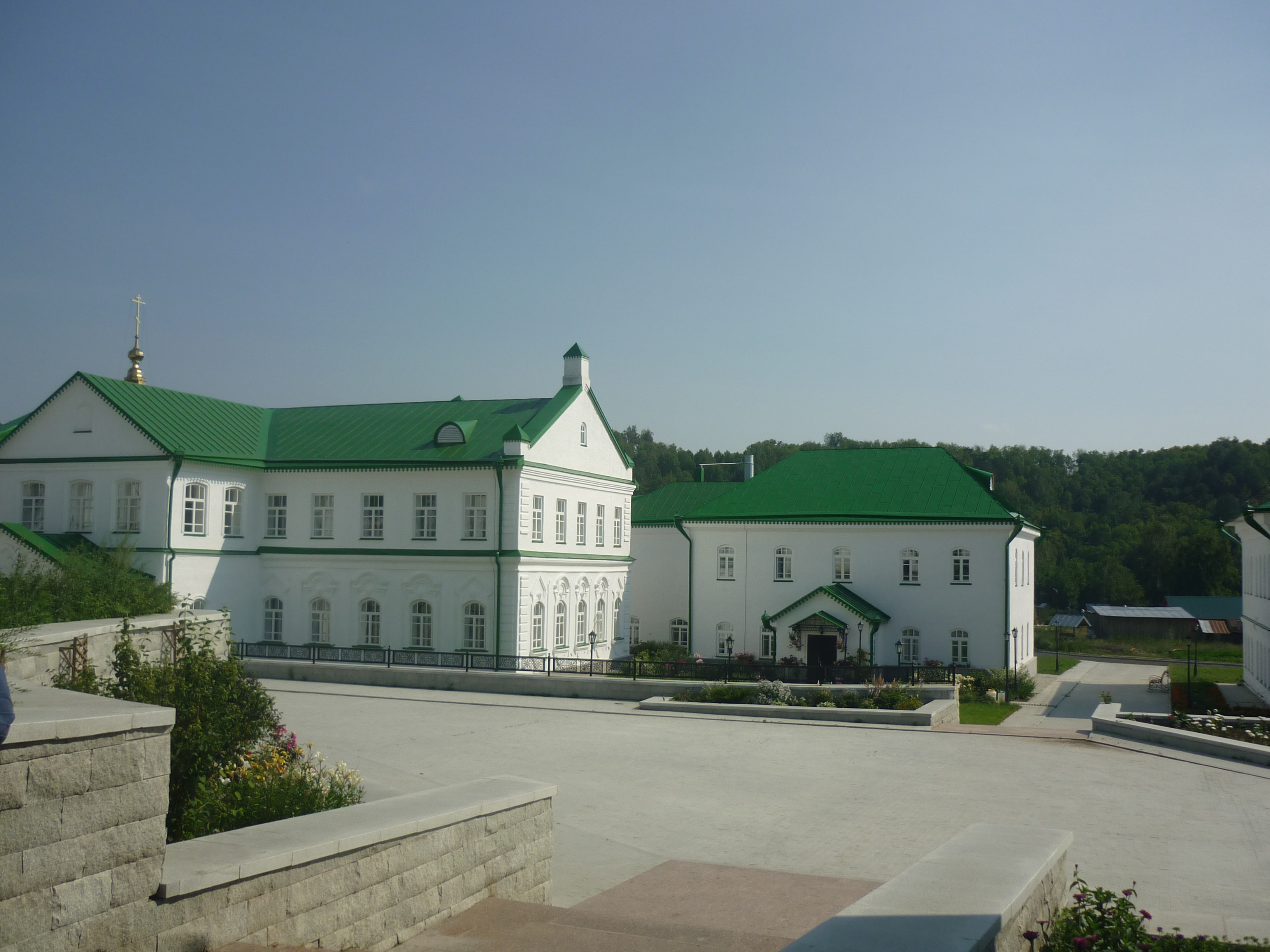 Ивановский монастырь (Тюменская область, Тобольск, 12 км от город тобольска)